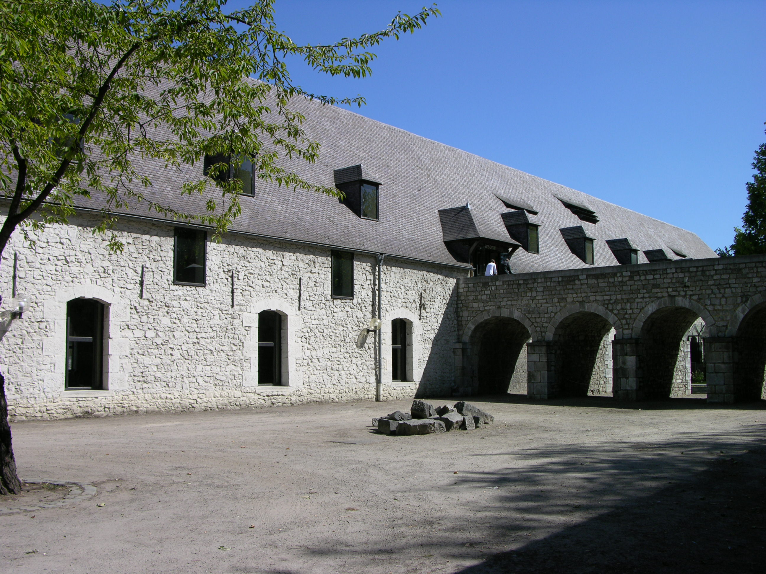 Bâtiment militaire construit en 1692-1693 sur les ordres de Vauban, commissaire général des fortifications sous Louis XIV. Construit en moellons de pierre calcaire, le vaisseau de 100 mètres de long abrite une solide charpente de chêne. Démilitarisé après la Seconde Guerre mondiale, il a été réaménagé entre 1977 et 1982 sous l'égide de l'architecte R. Bastin afin de devenir le restaurant universitaire des Facultés Notre-Dame de la Paix.